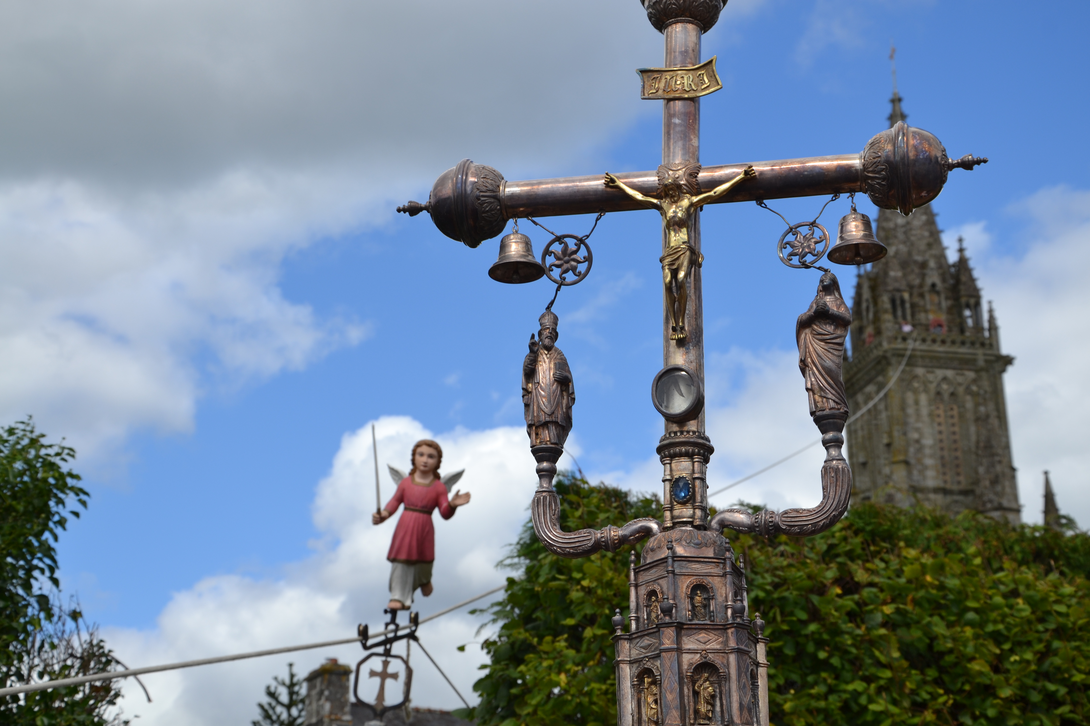 Descente de l'ange pyrophore du clocher de la chapelle Notre-Dame de Quelven.